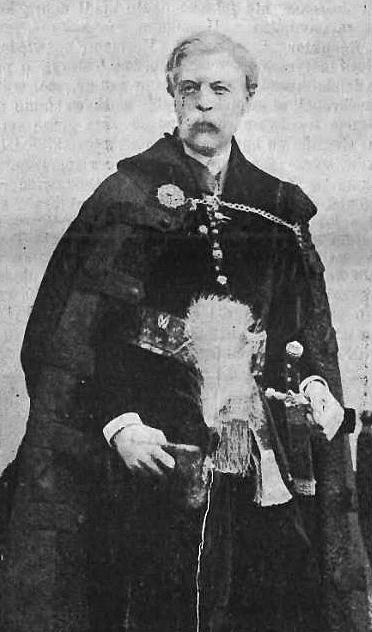 Mieczysław Dunin-Borkowski (-1906)